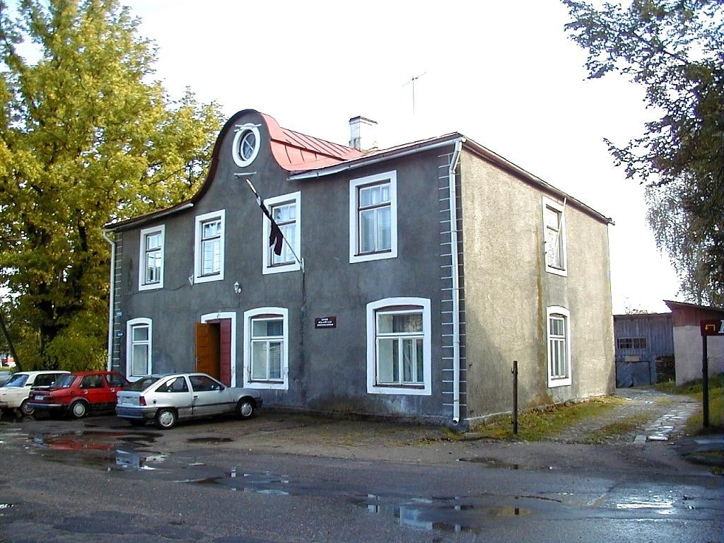 Apes novada dome